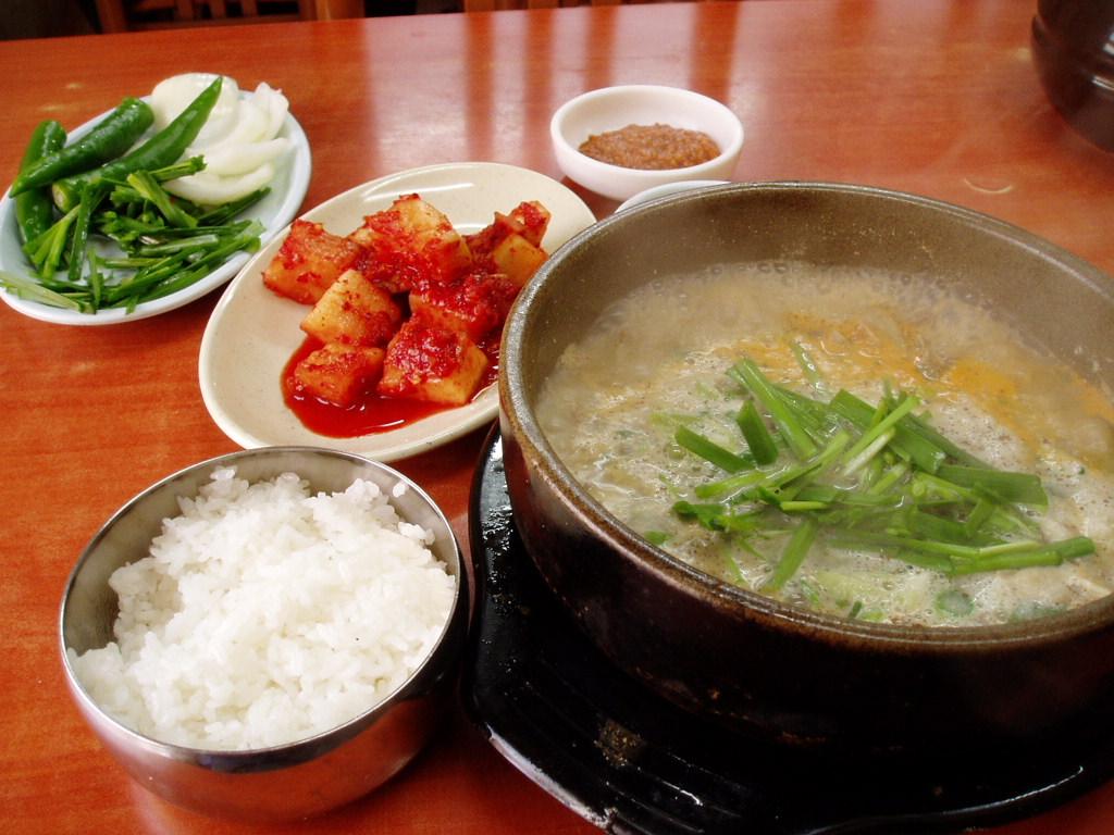 Korean soup-Sundae gukbap